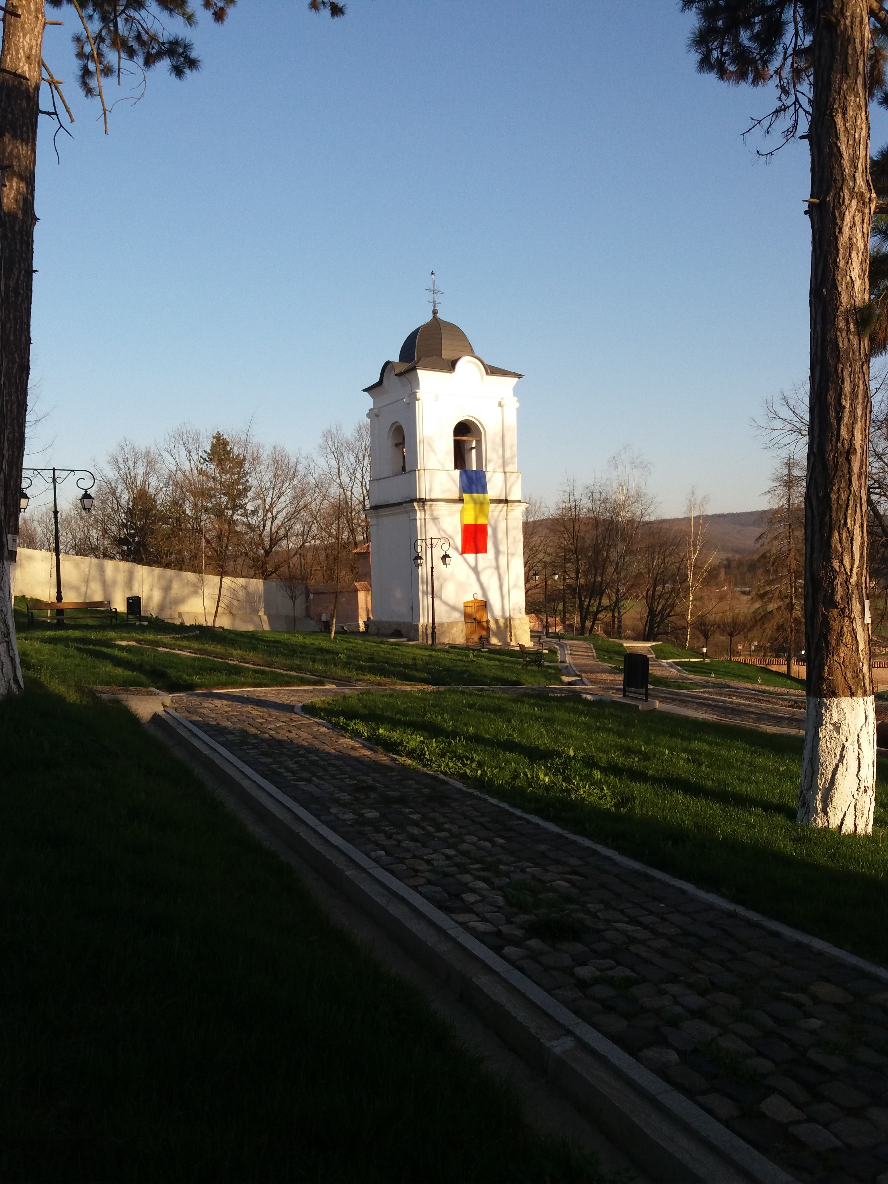 Mănăstirea Coșula este o mănăstire de călugări amplasată în satul Coșula (din județul Botoșani), la o distanță de 20 kilometri sud-est de orașul Botoșani. 06